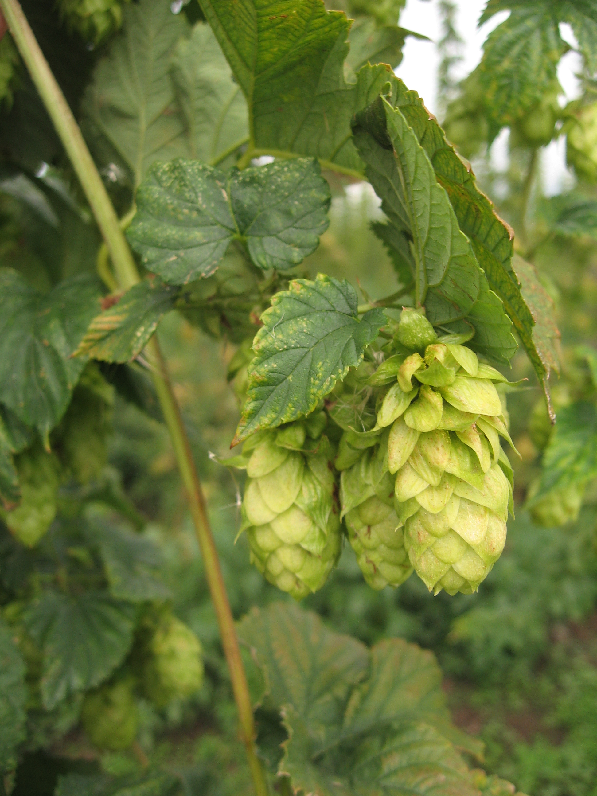 Humulus lupulus, Chmel otáčivý na chmelnici u Ctiněvsi